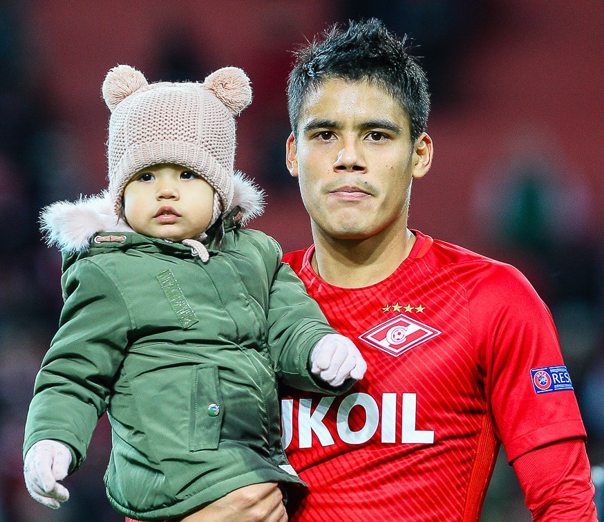 Lorenzo Melgarejo